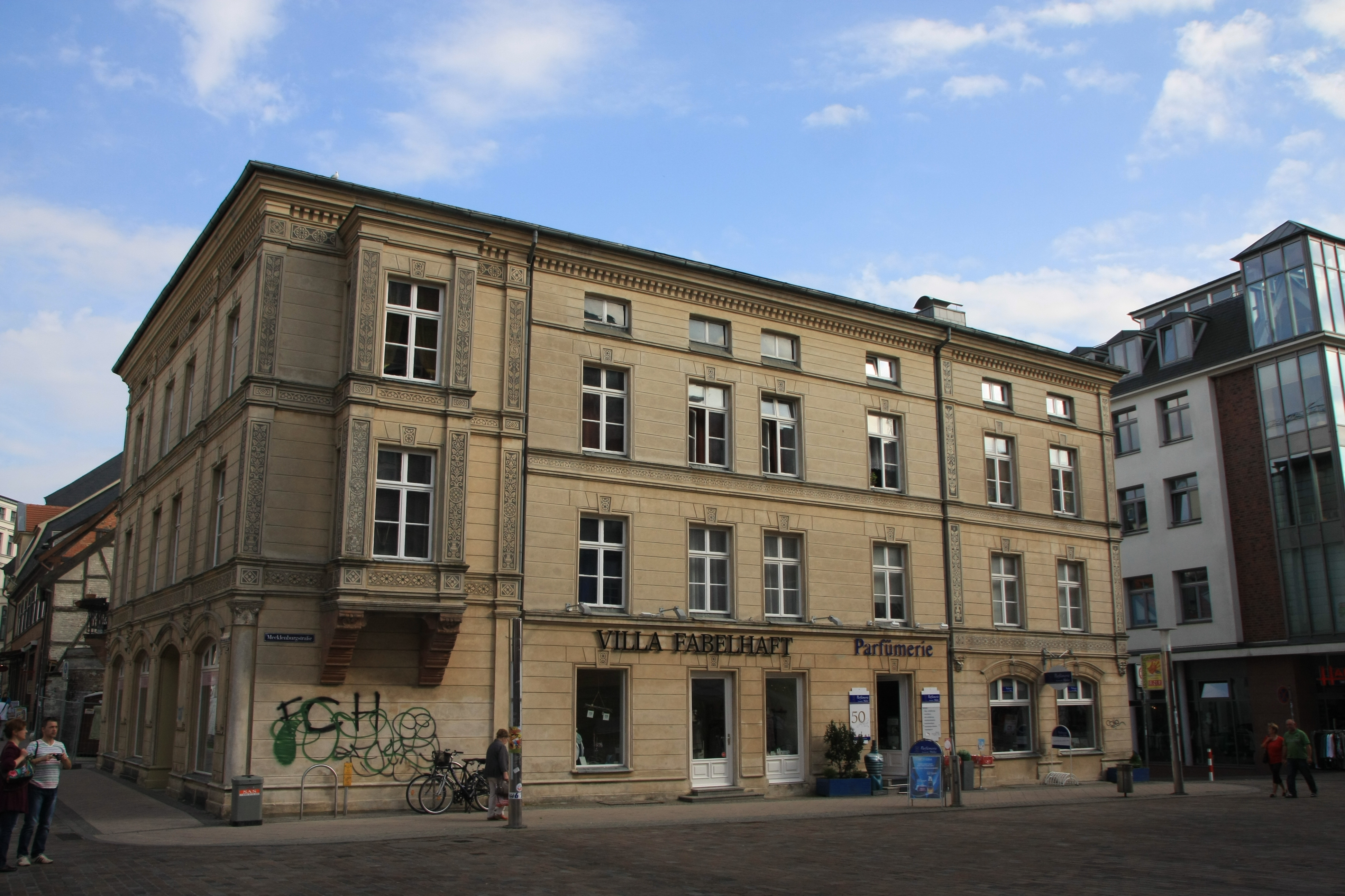 19053 Schwerin, Schloßstraße 30